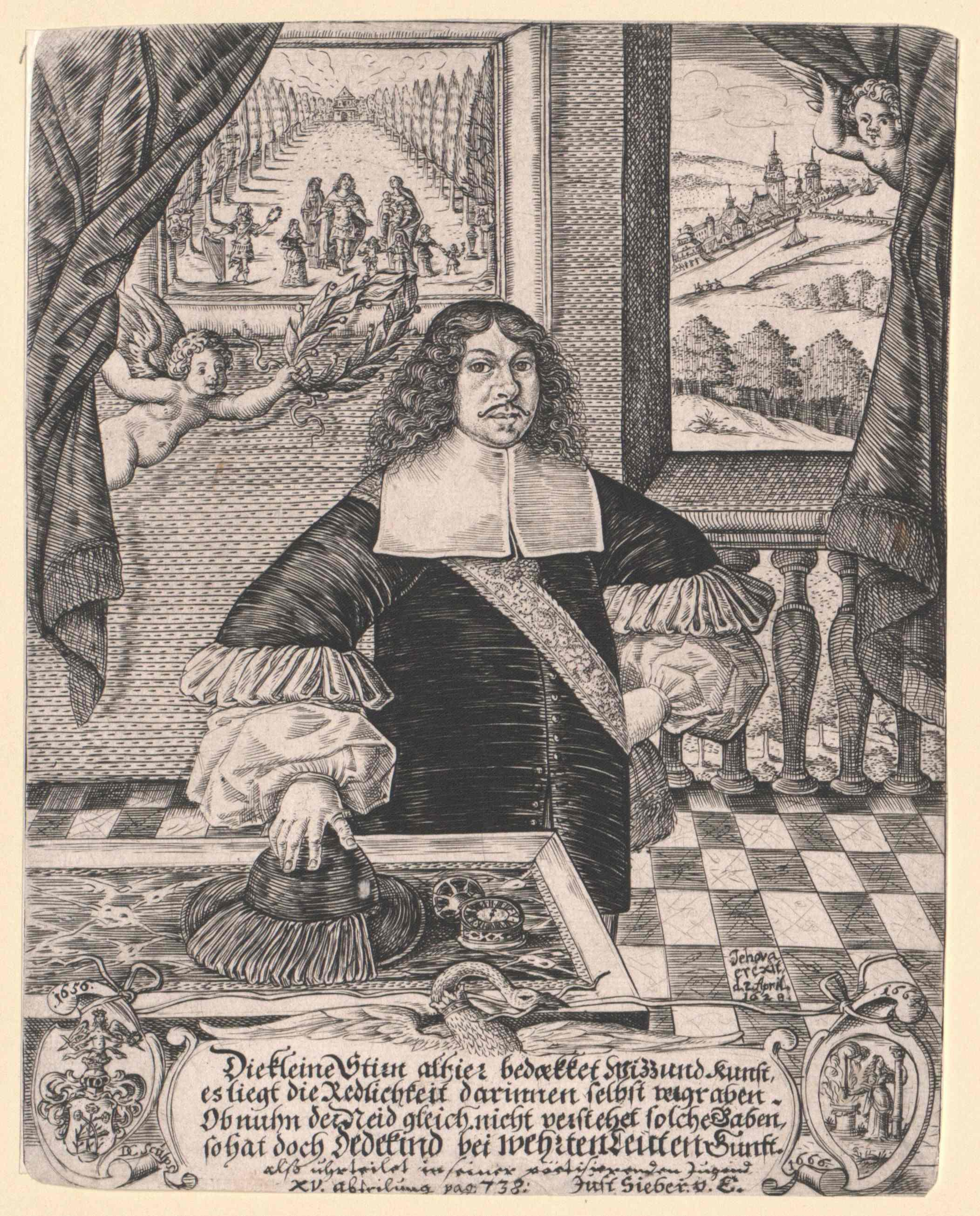 Porträt des Sängers und Autors Constantin Christian Dedekind